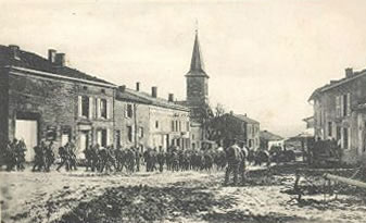 armée wavrille